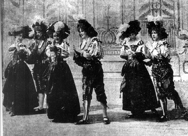 Eredeti fotogram a táncz című fekete-fehér magyar némafilmből. Ez volt az első tudatosan rendezett magyar filmalkotás.